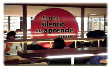 mesas para estudio en silencio